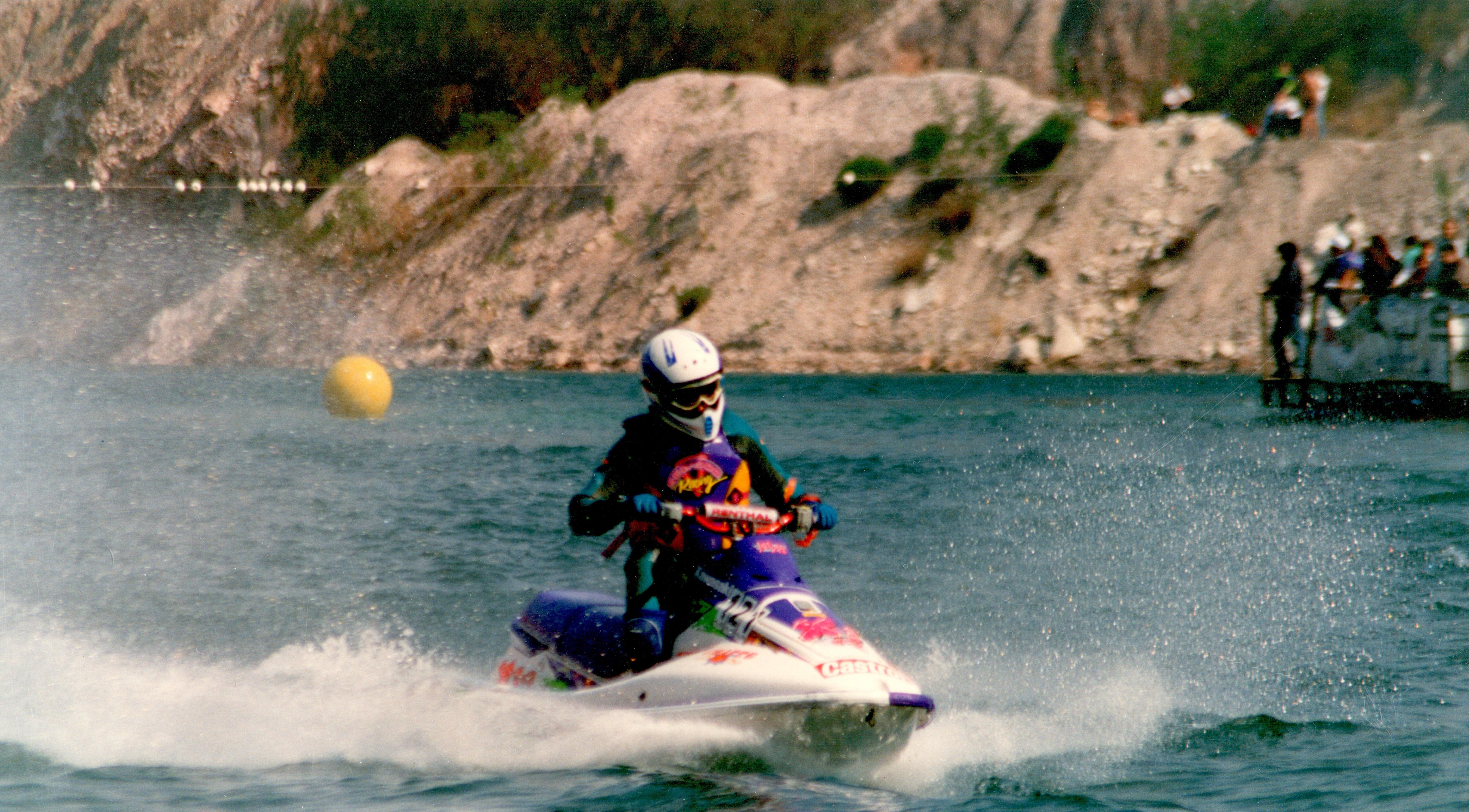 Jet Ski kawasaki XI 750 R, Laguna Azul, Córdoba, República Argentina Fernando Jorge Bigi